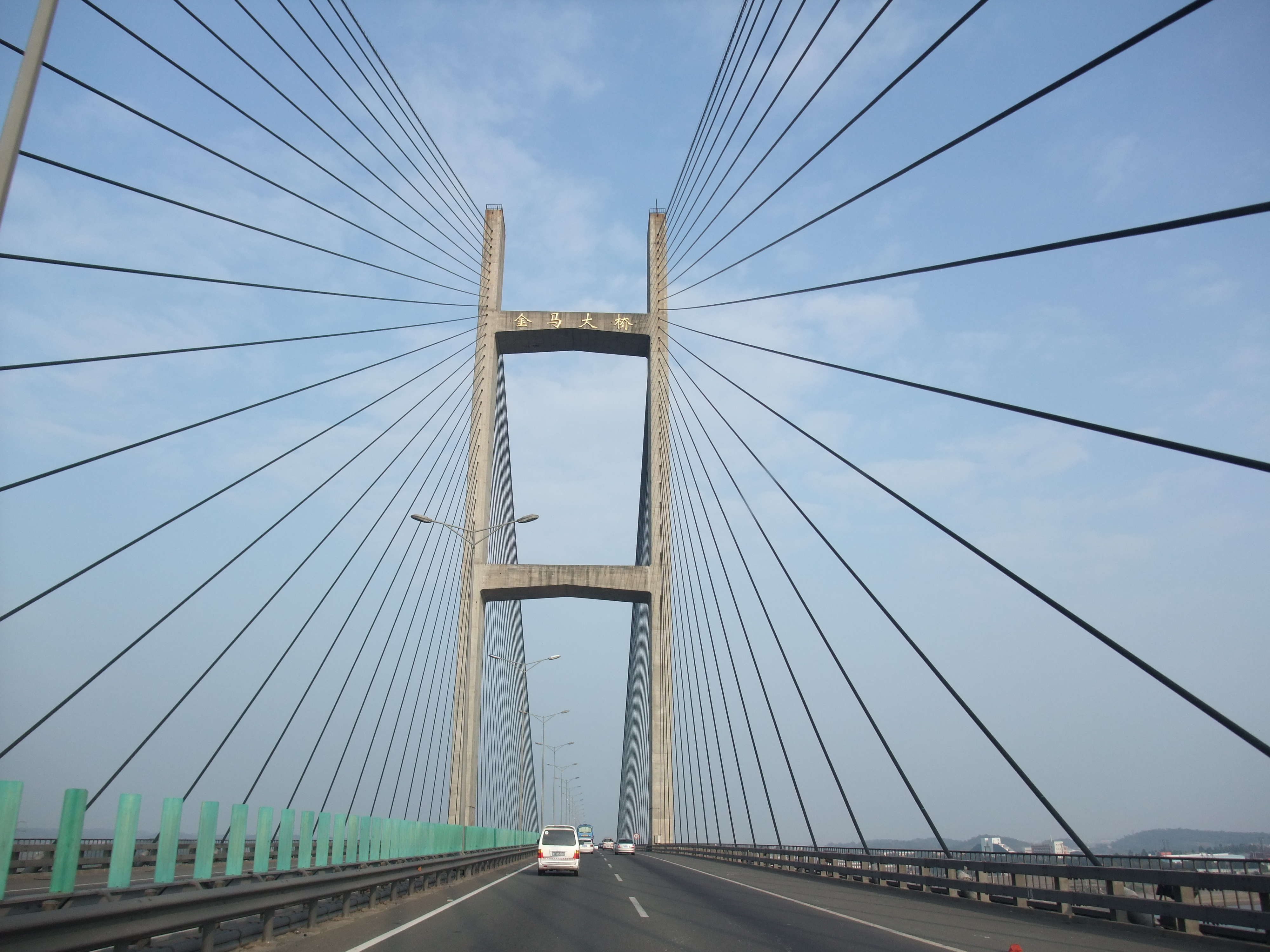 金马大桥